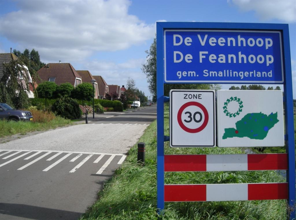 De Veenhoop